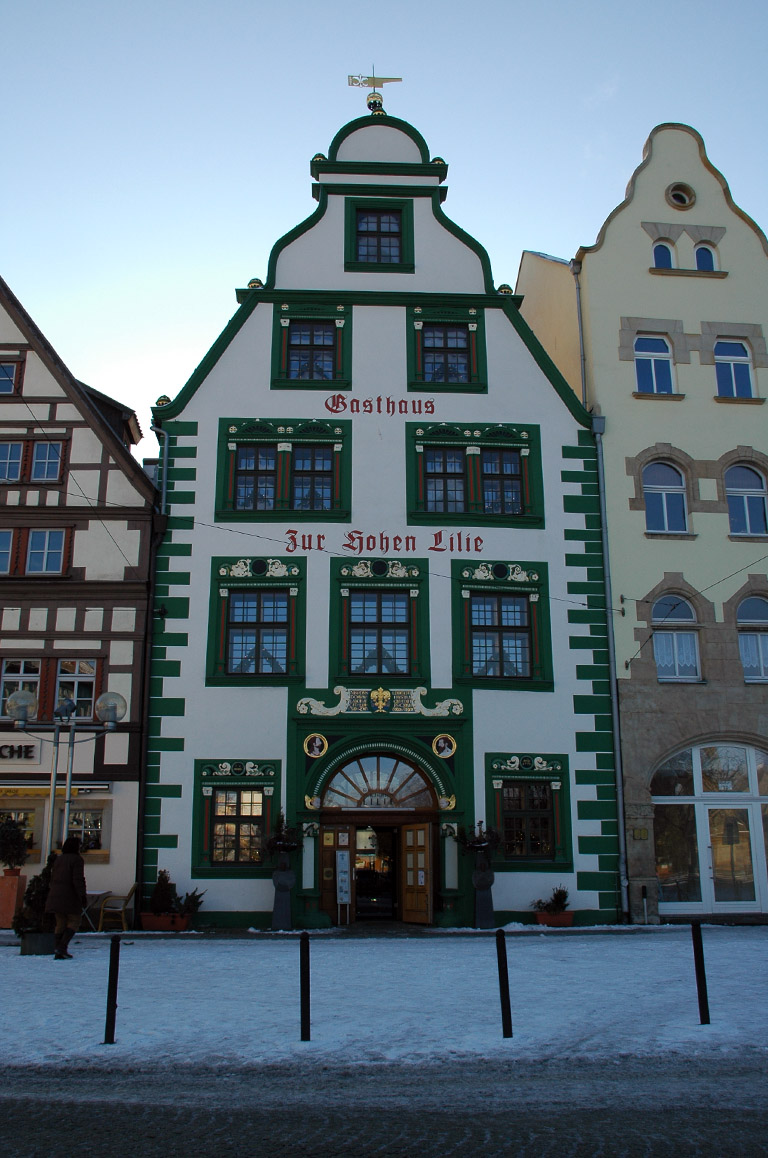 Haus zur Hohen Lilie am Domplatz in Erfurt